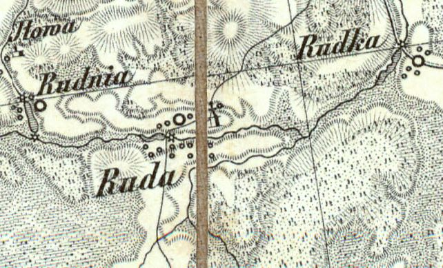 Ruda (Ziemia chełmska) na mapie Reymanna (XIX w.)